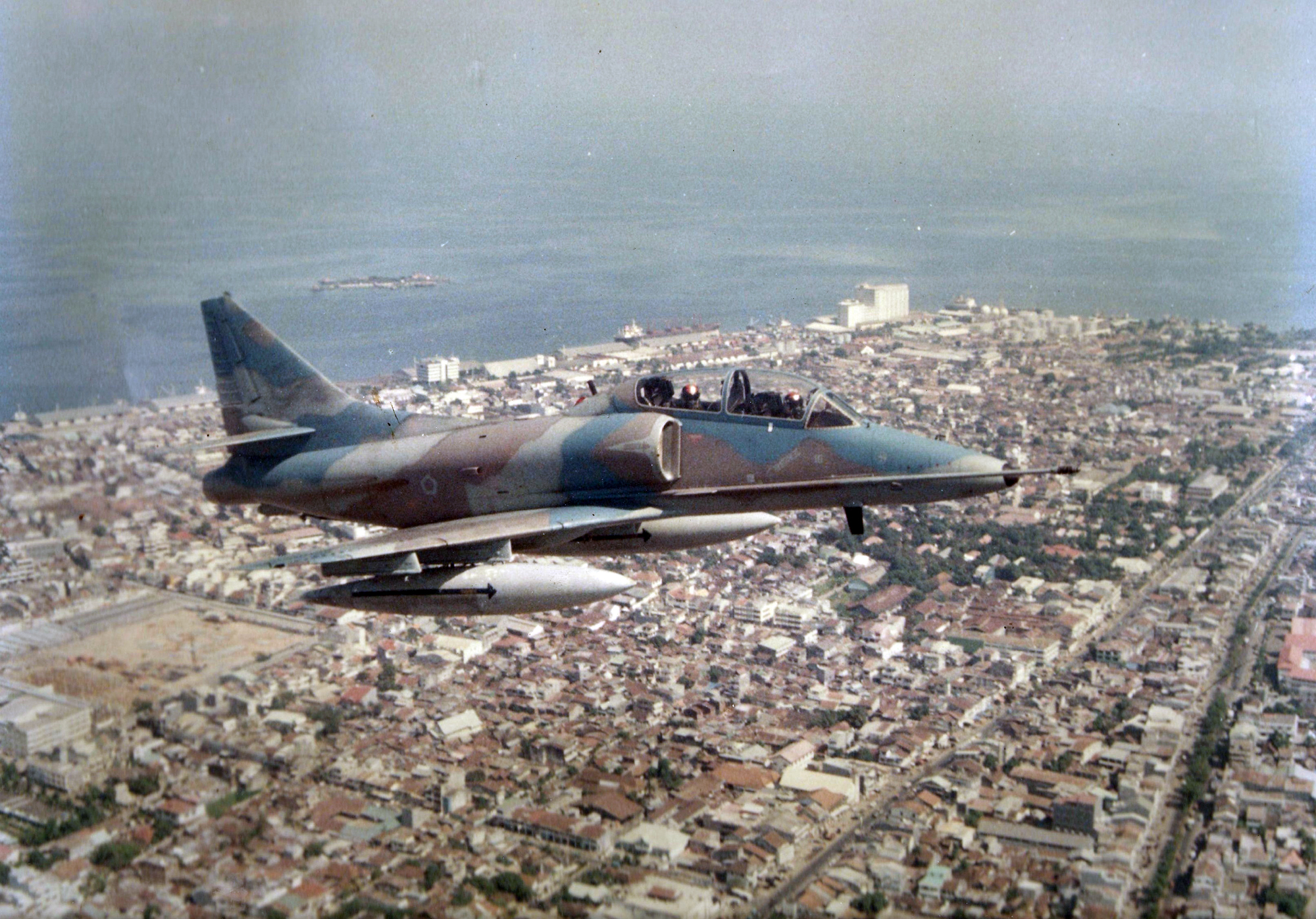 A-4 Skyhawk TNI AU dengan Tempat Duduk Ganda